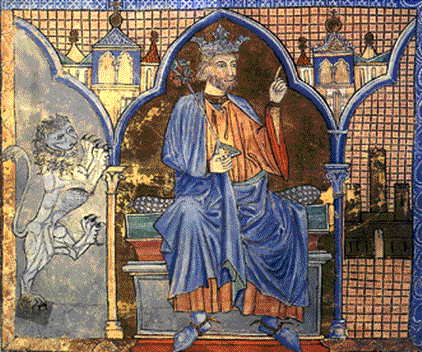 Miniature enluminée représentant le roi Ferdinand III de Castille et León. Issue de l'Índice de los Privilegios reales. XIII° siècle. Conservé à la Cathédrale de St-Jacques-de-Compostelle.